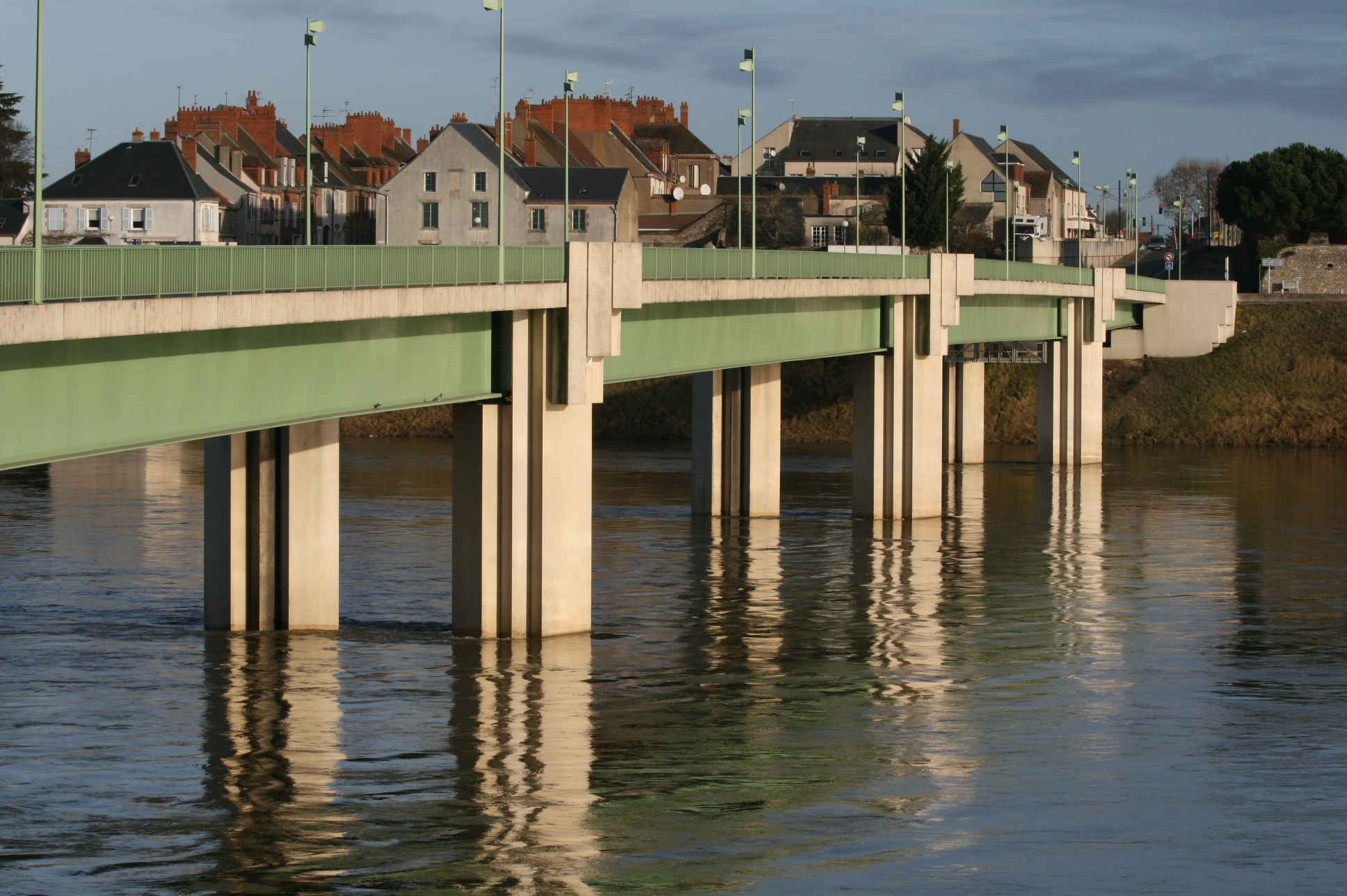 Pont de Jargeau (Loiret - France)